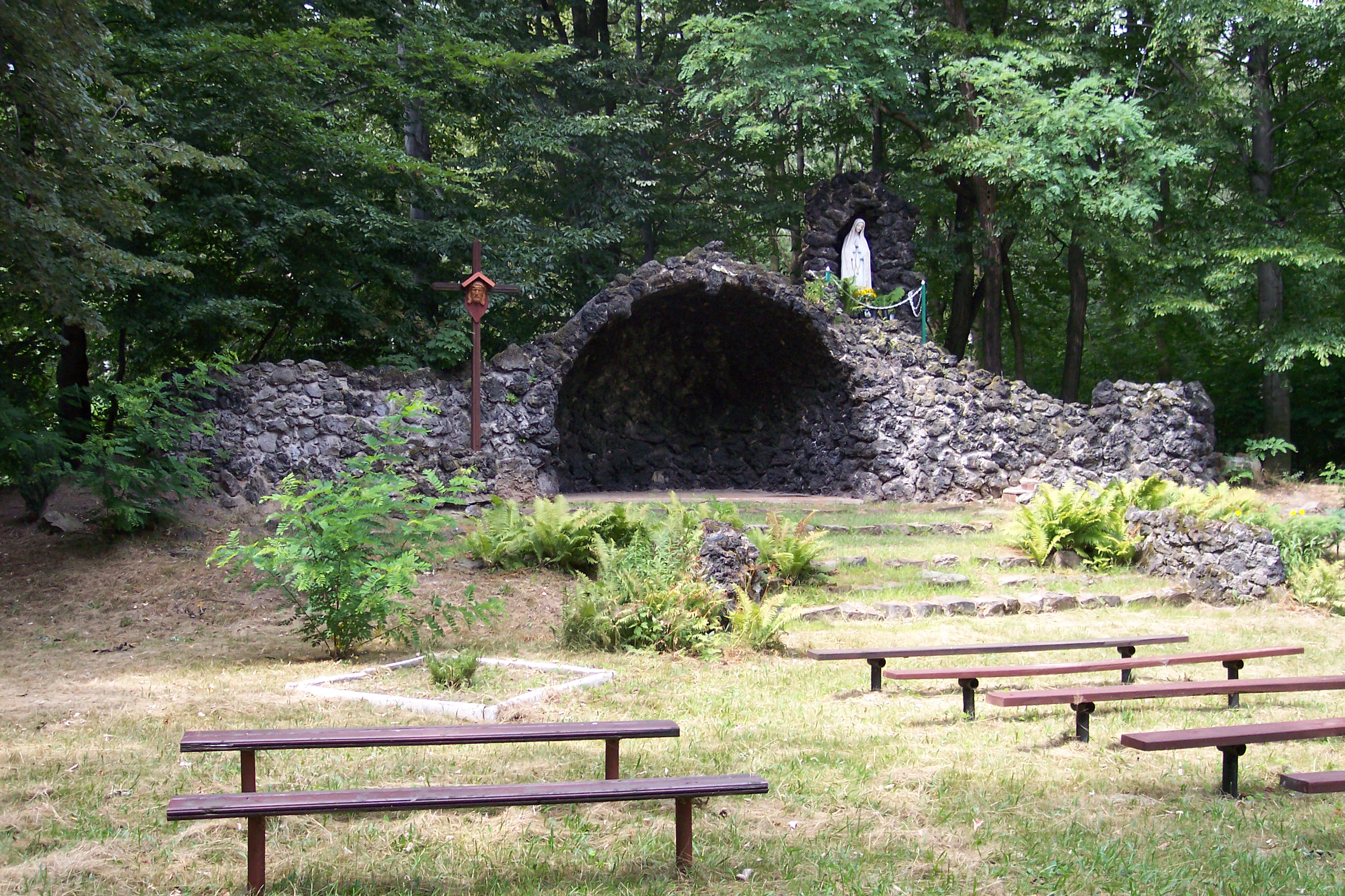 Grota w Rachowicach